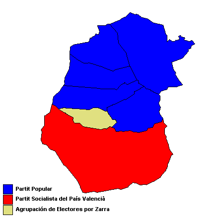 Partits polítics més votats als municipis de la Vall de Cofrents (País Valencià) després de les eleccions municipals de 2007.